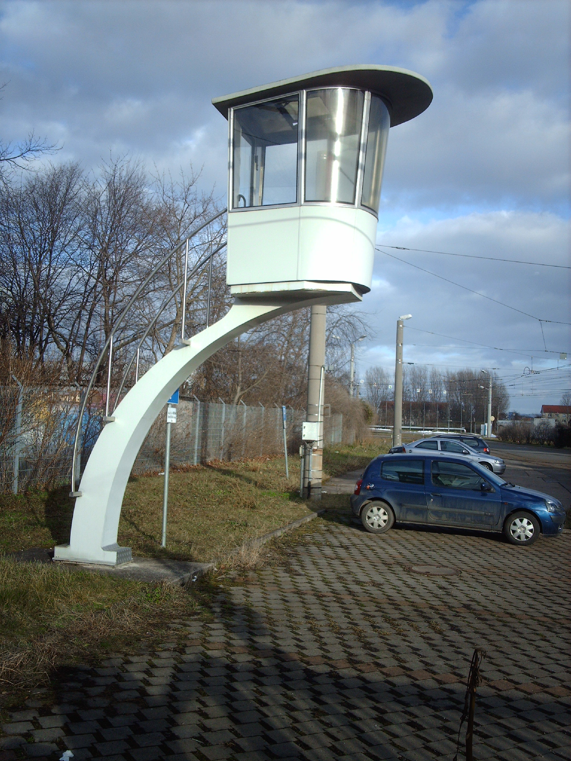 Die Verkehrskanzel ("Angerturm") wurde früher zur Verkehrsregelung am Anger verwandt. Nach der Restauration wurde diese im Eingangsbereich des Straßenbahndepot in der Magdeburger Allee aufgestellt.